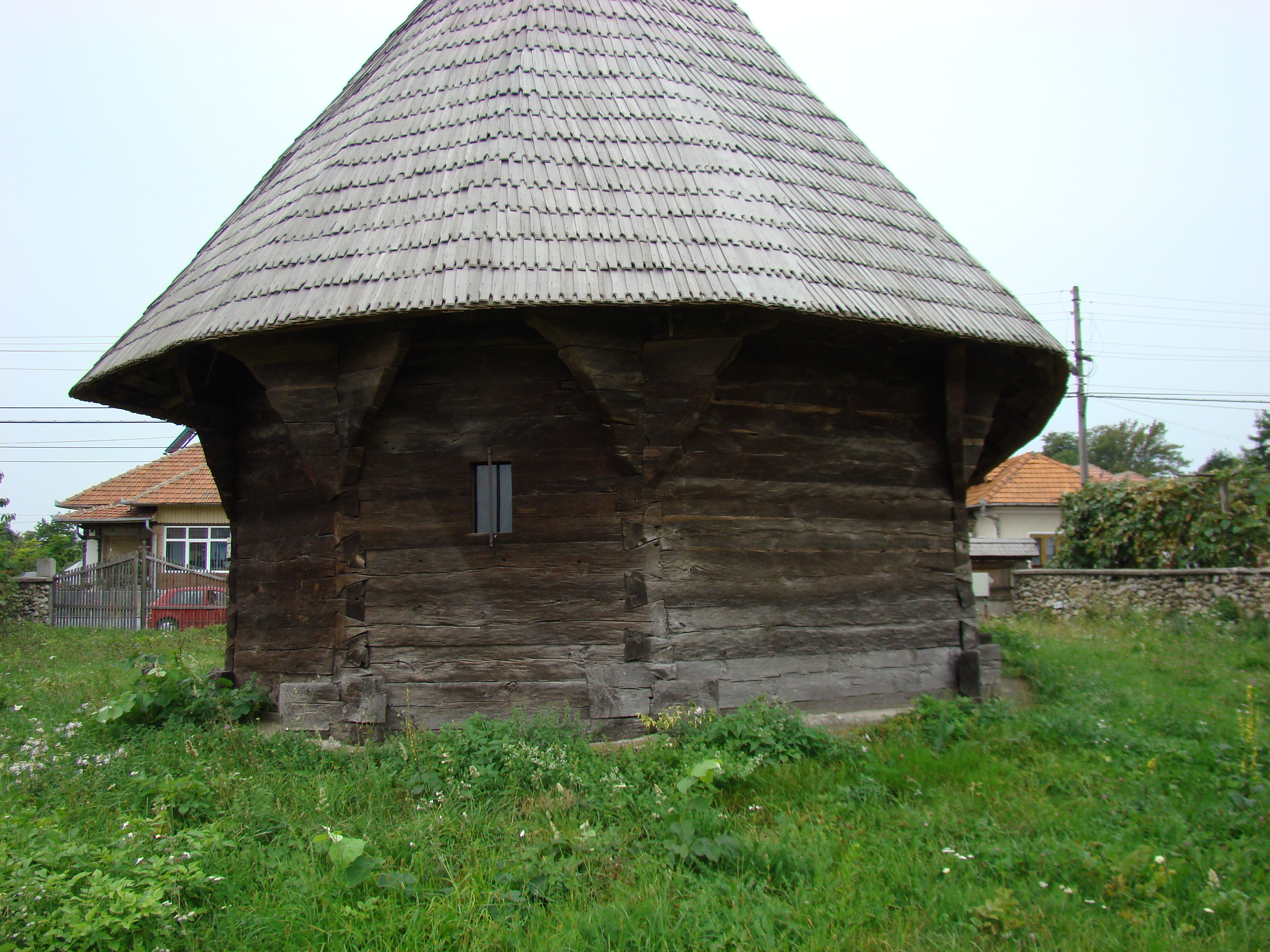 Biserica de lemn „Cuvioasa Paraschiva” din Peștișani, județul Gorj